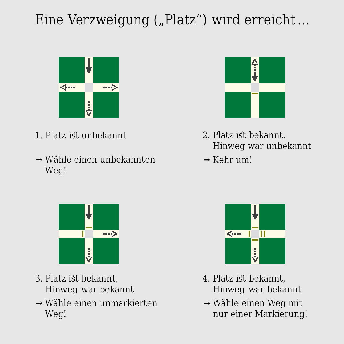 Schaubild zu den Verzweigungssituationen bei Tremaux' Methode